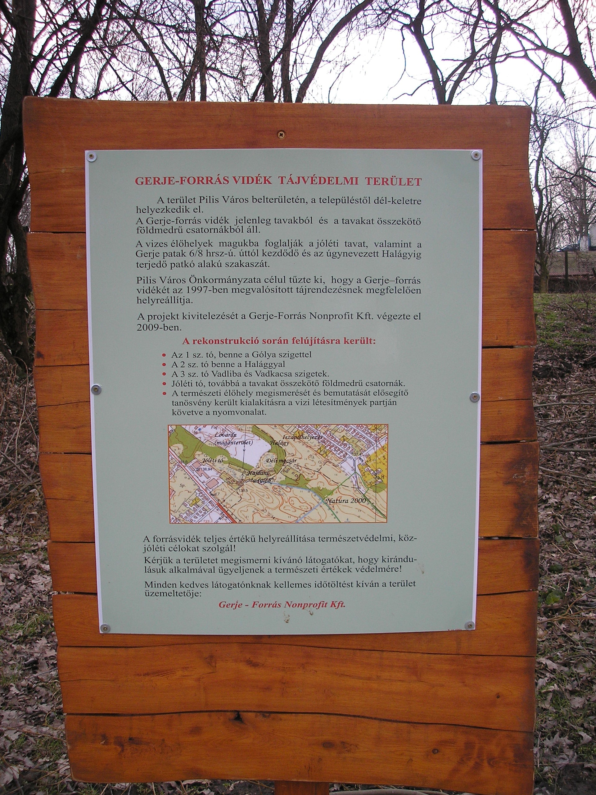 A Gerje Tájvédelmi Terület ismertető táblája Pilis városban (Pest megye)